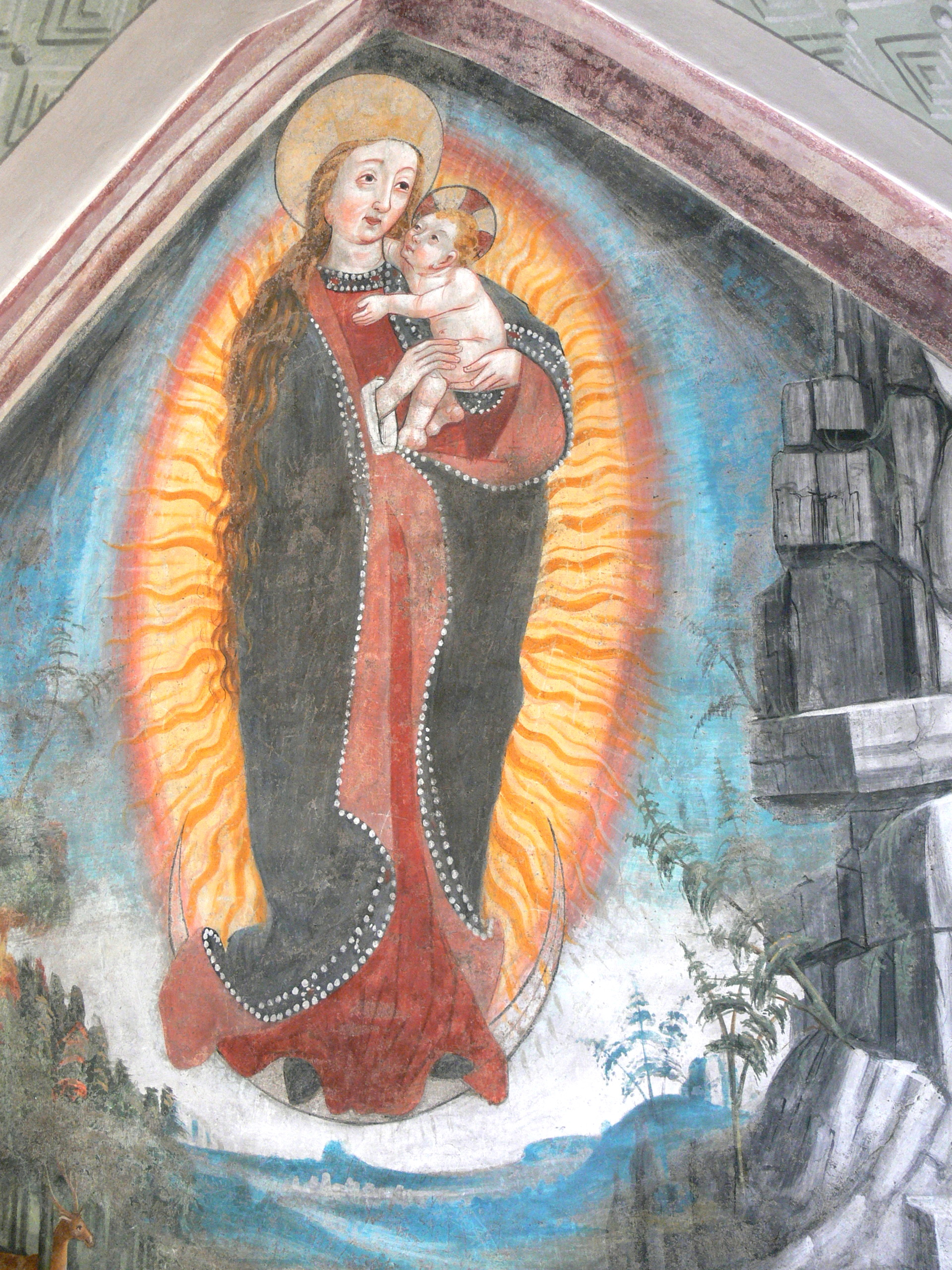 Madonna mit Kind als apokalyptisches Weib